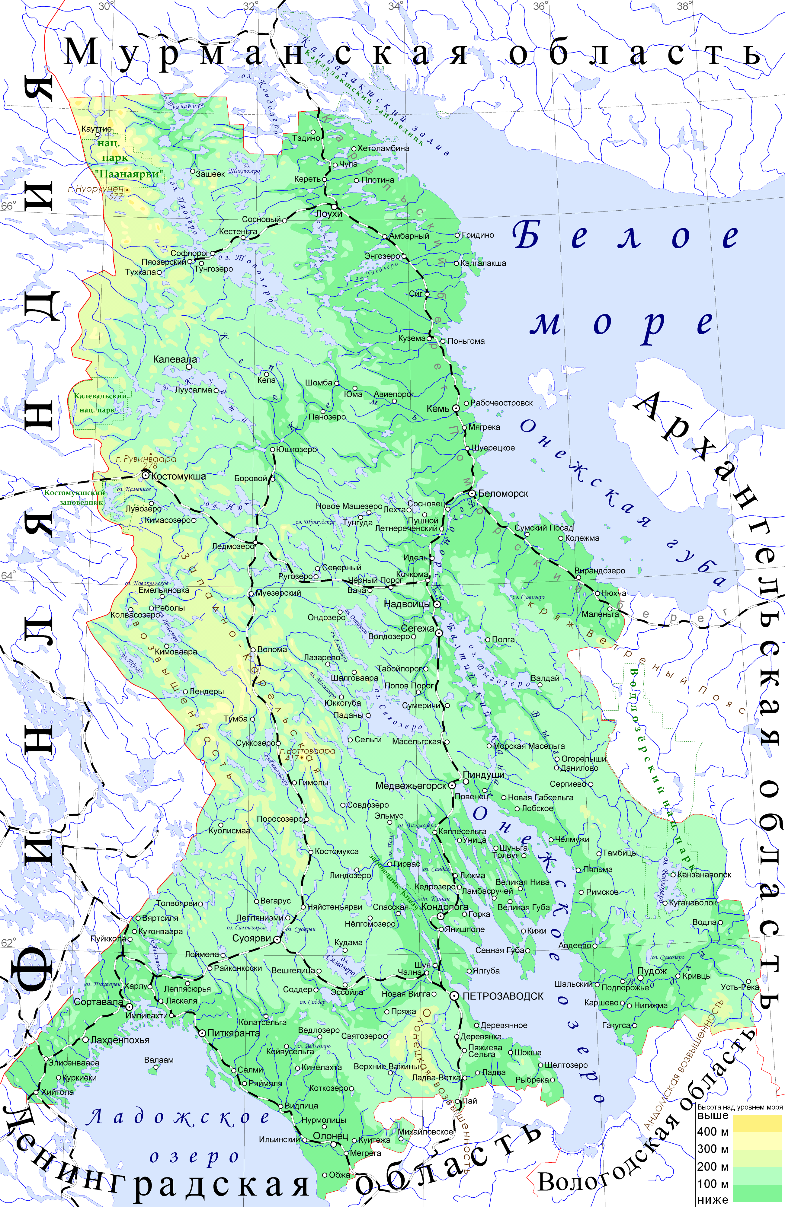 физическая карта Карелии